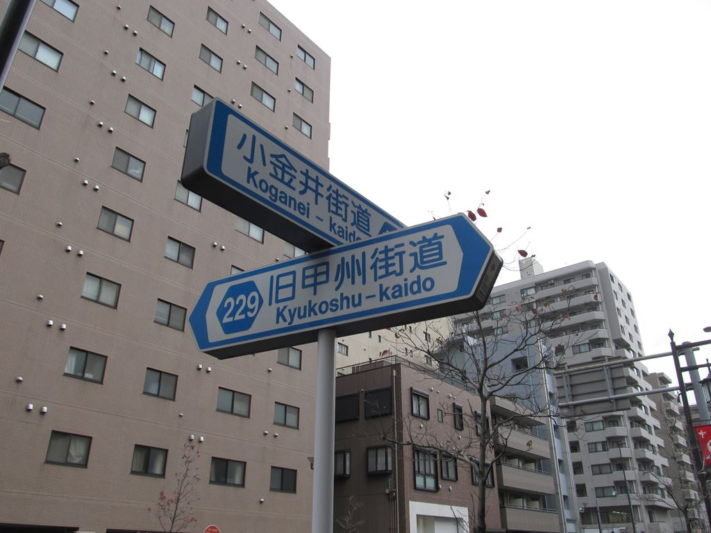 東京都府中市八幡省。旧甲州街道。小金井街道（新小金井街道）。東京都道15号府中清瀬線起点、八幡町交差点。